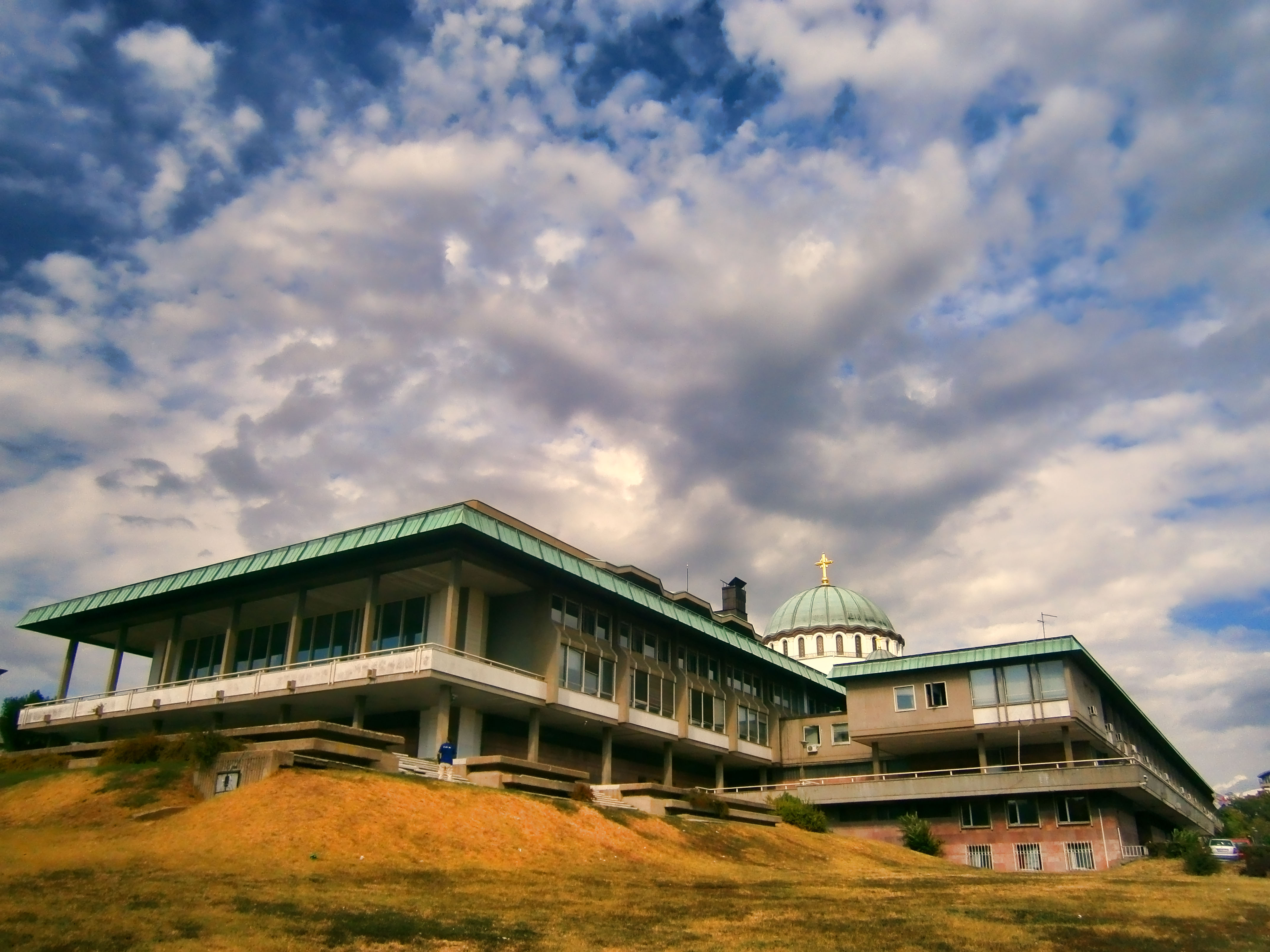 Постојећа зграда Народне библиотеке на Врачару изграђена је 1973. године. Зграду је пројектовао архитекта Иво Куртовић и убраја се у споменике културе.